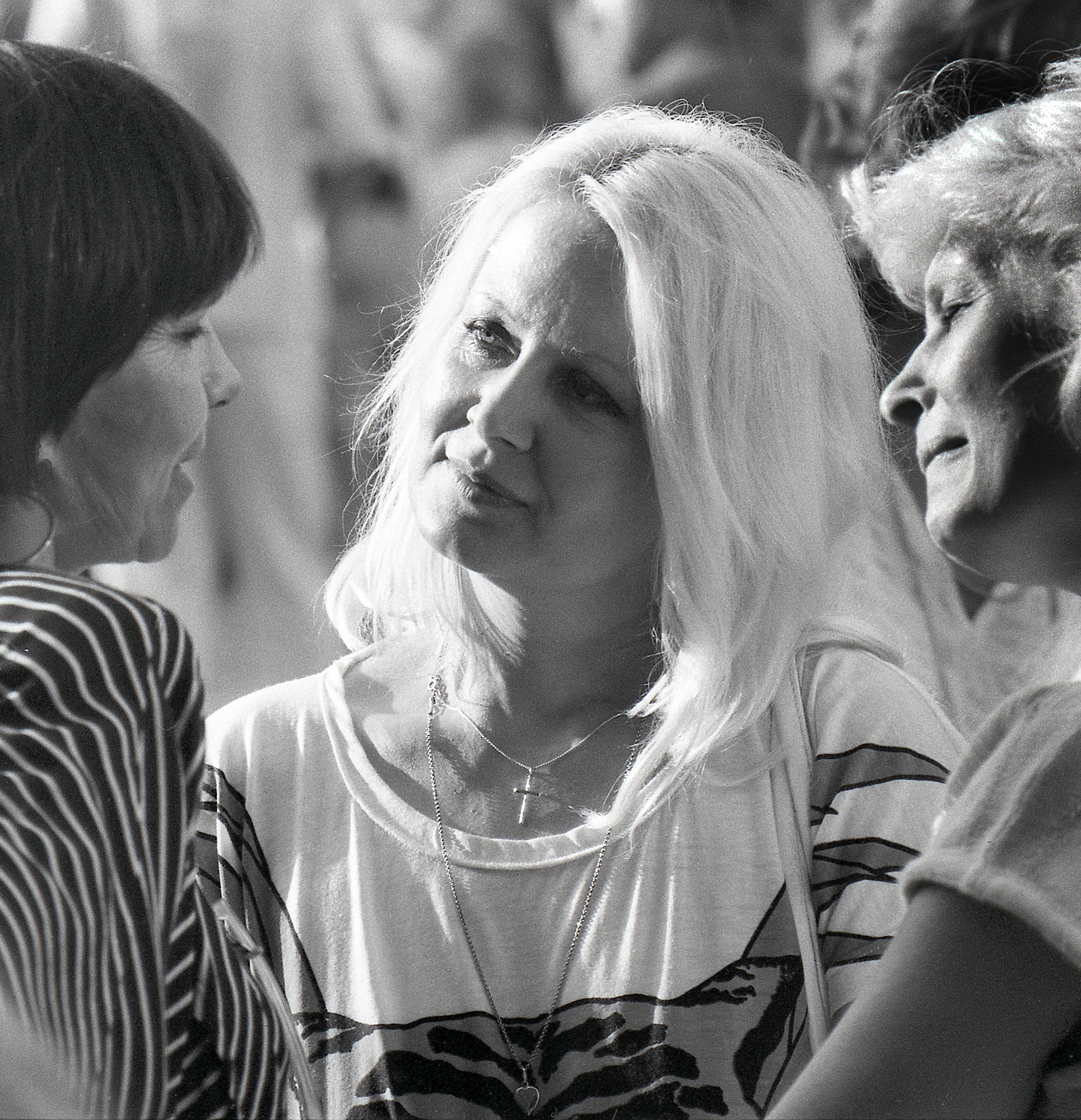 Eve Kivi, filminäitleja 1988